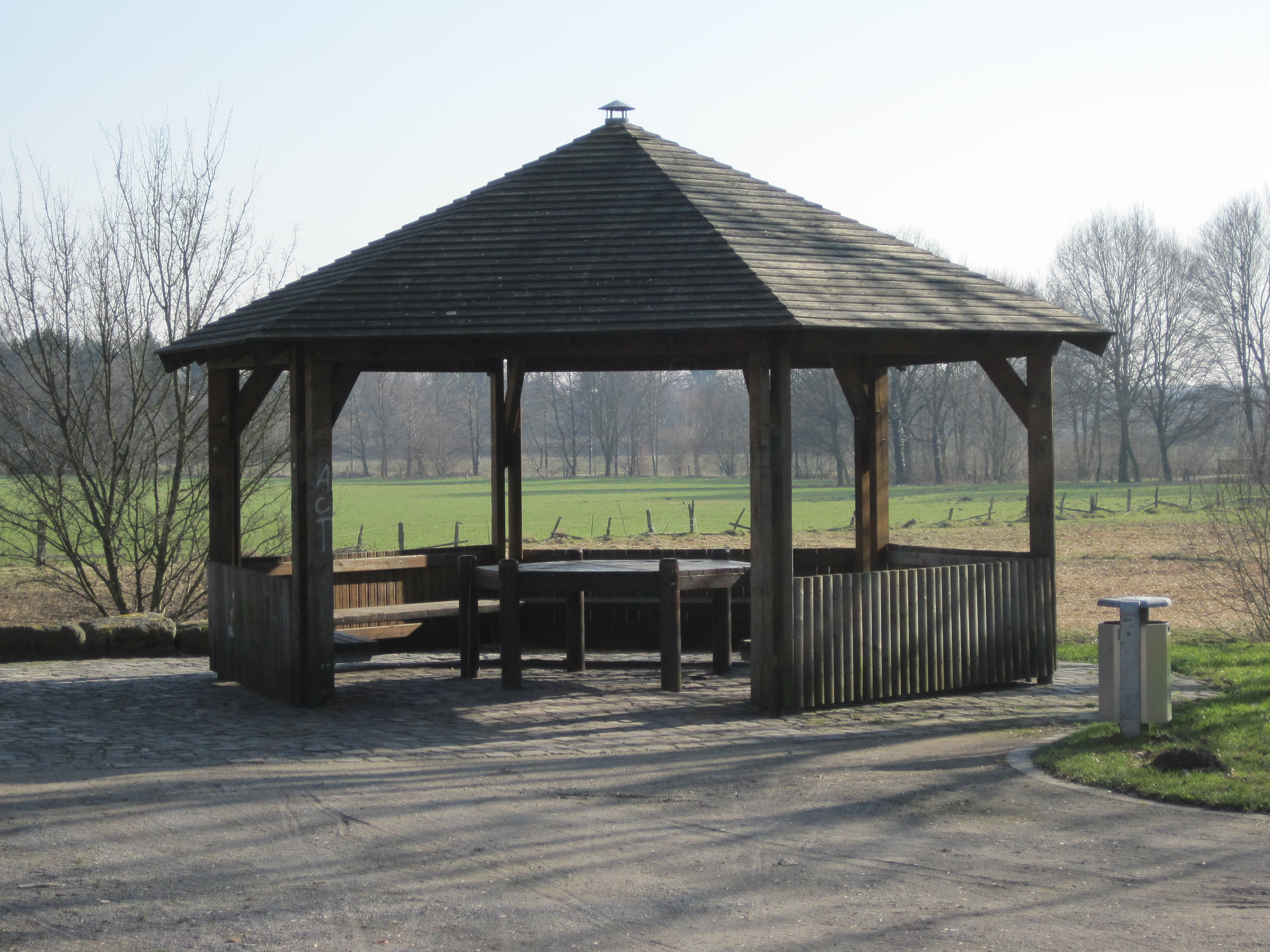 Dieses Foto zeigt den Holzpavillon auf dem Burghügel Mark (Vorburg) in Hamm.